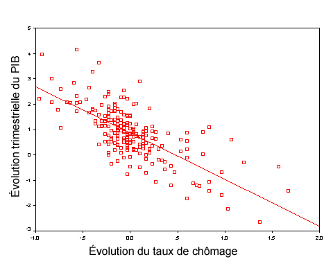 Illustration de la loi d'Okun avec légende en français. Adaptation de Image:Okuns_law_charter_quarter.JPG Okun's law. Quarterly GNP growth (NOT ANNUALIZED) and change in the unemployment rate. US data from US agencies from a file located here. Data from 2nd quarter 1947 through 4th quarter 2002. Made using SPSS. Regression results: -1.827 Beta on unemployment change (Std error .123), .856 constant (.049), adj R2 at .504. All vars and f-test .000 signifance. %Change GNP = .856 - 1.827(Change Unemployment Rate)